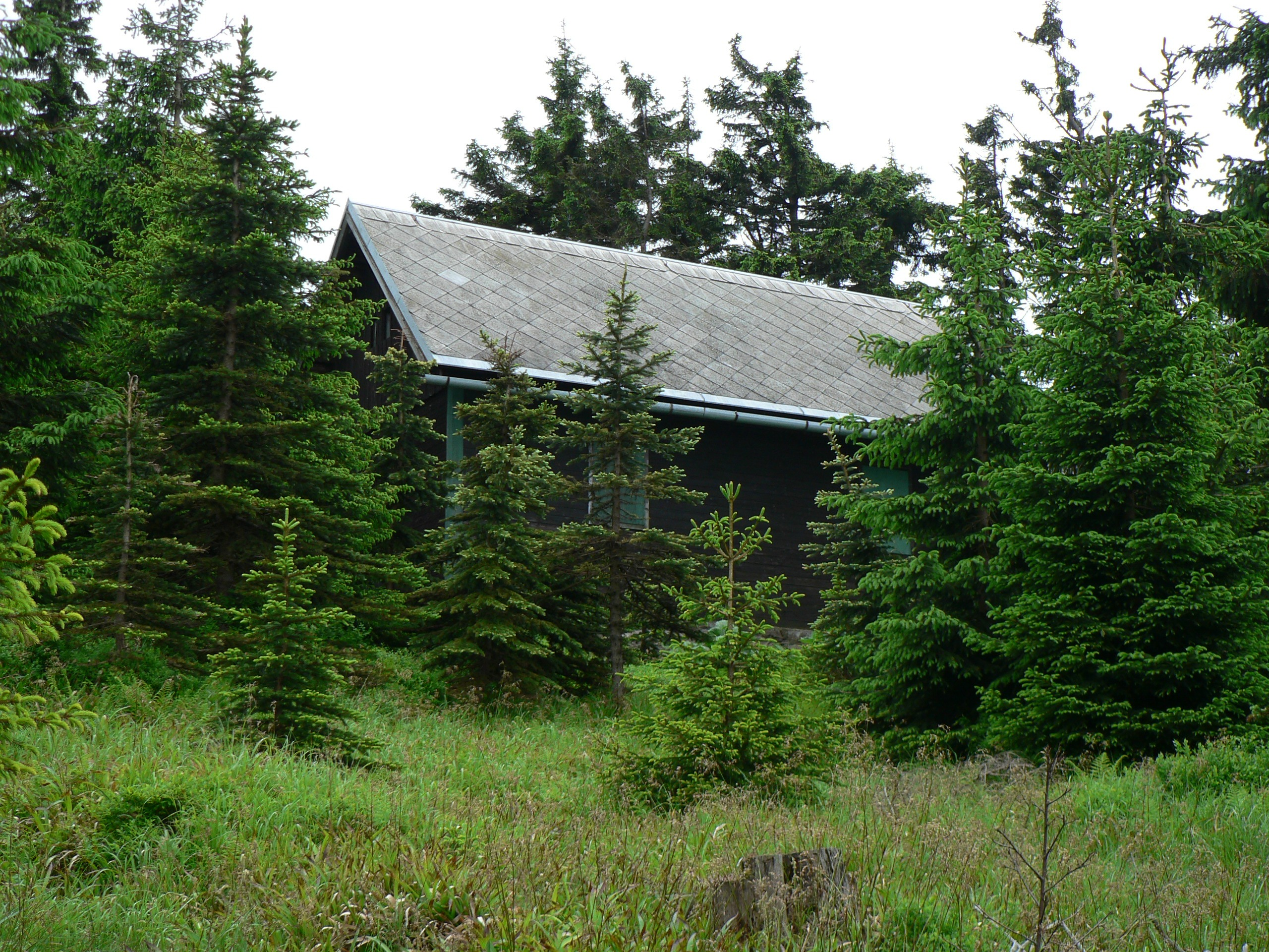 Tetřeví chata - lovecká chata pod vrcholem Orlíku